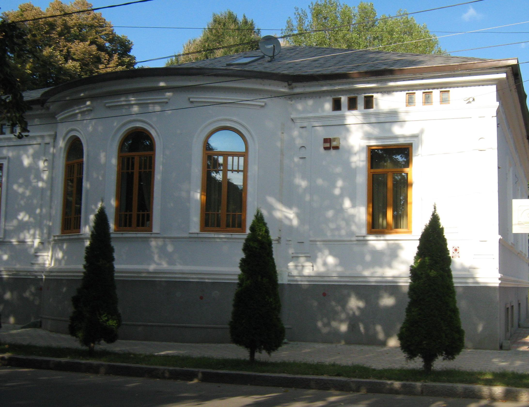 Galati - Casa Costache Negri